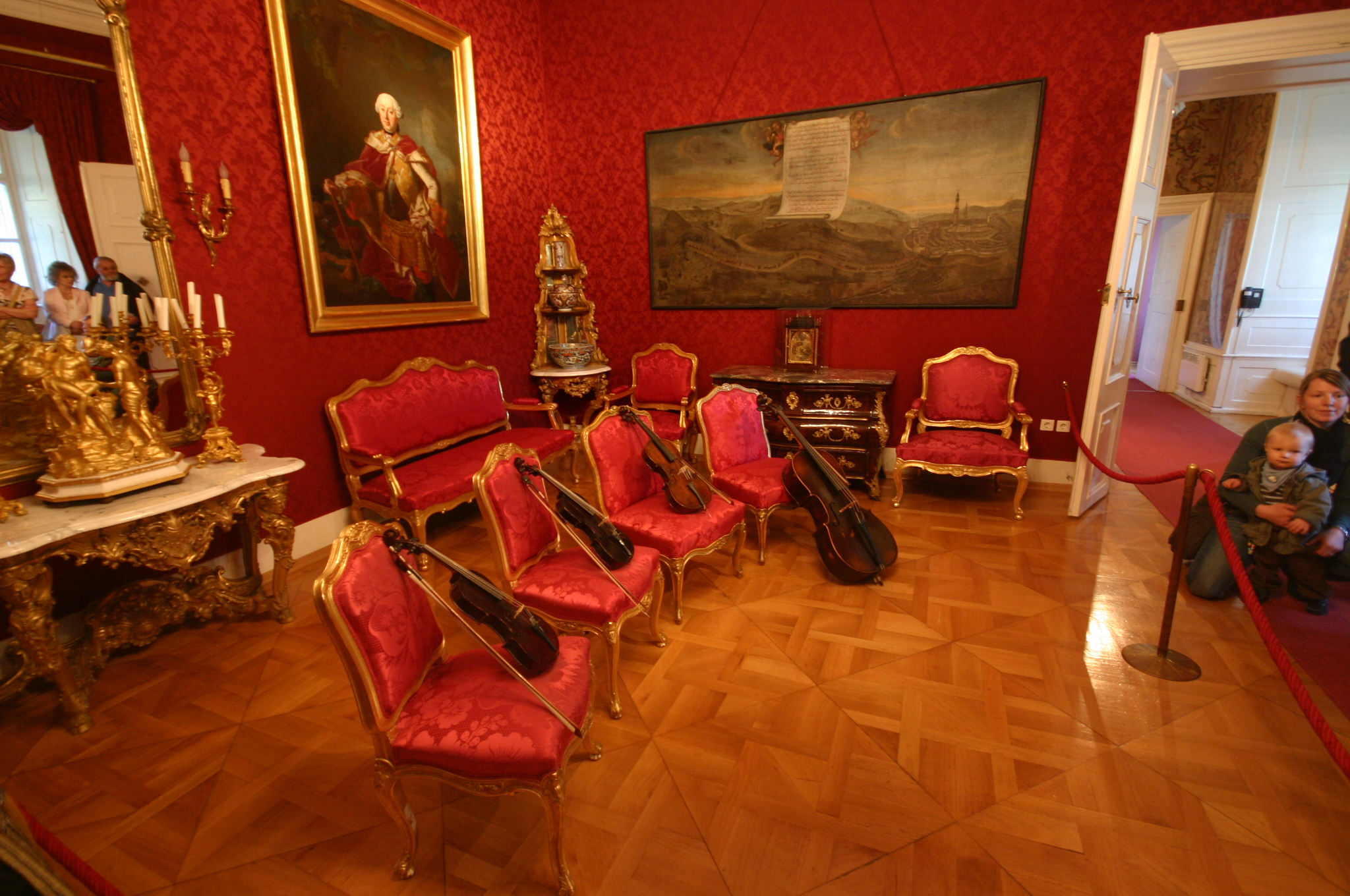 Empiresaal Schloss Esterházy